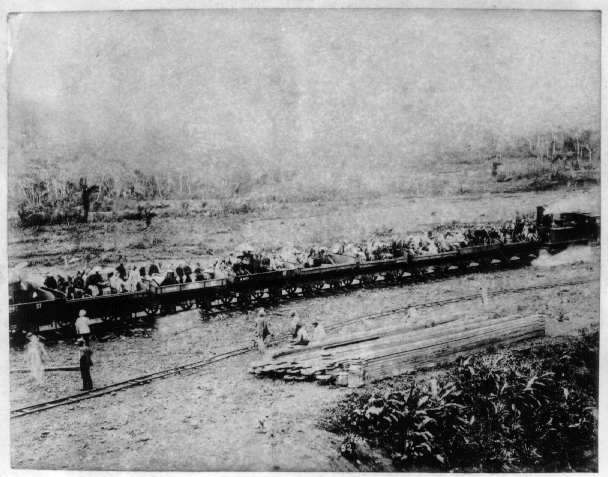 Construção do Canal do Panamá, Gatún, Panamá, dragas "Dingler" e "Apleton".